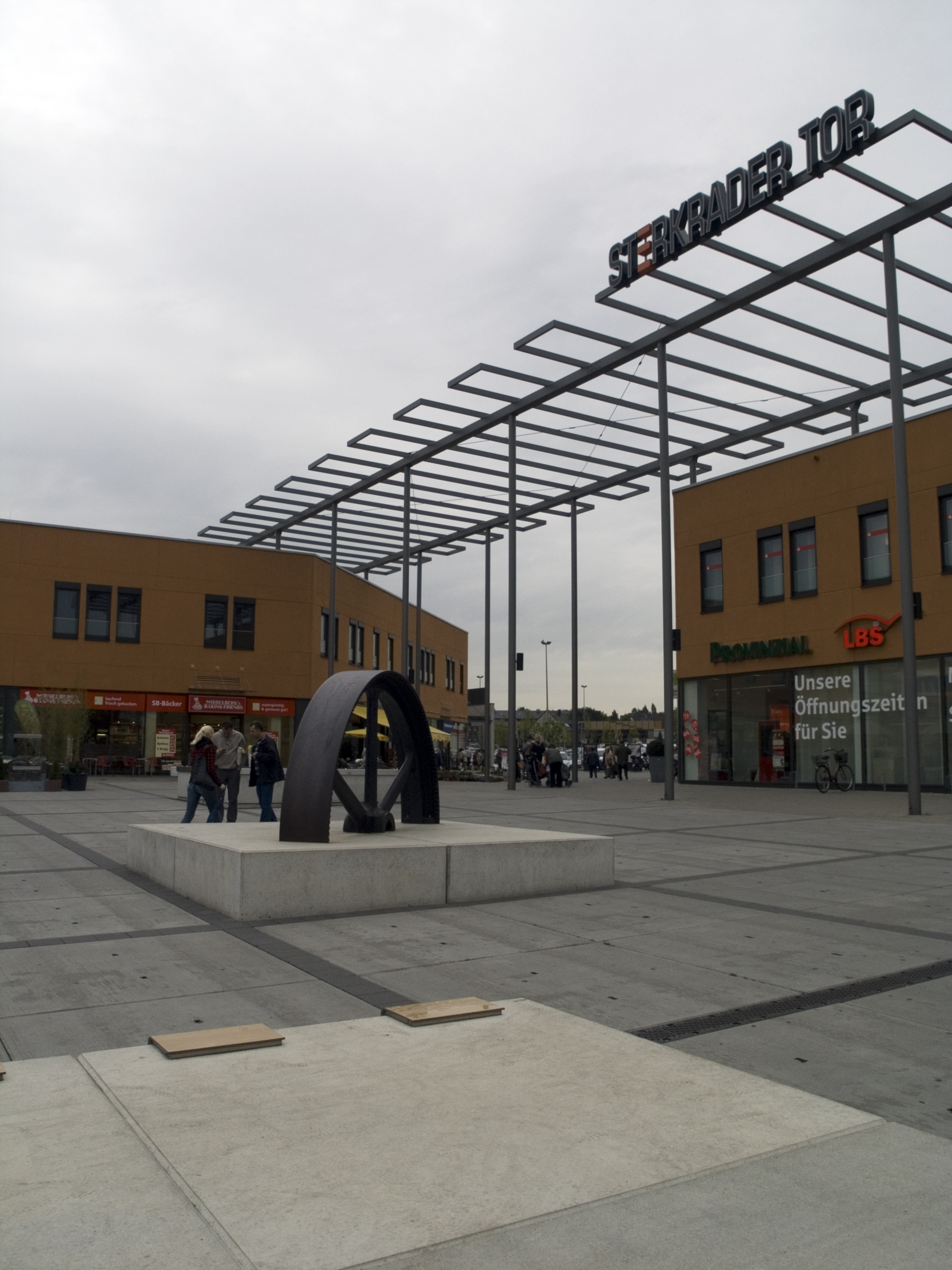 Северный Рейн - Вестфалия, Оберхаузен, Штеркраде - Sterkrader Tor